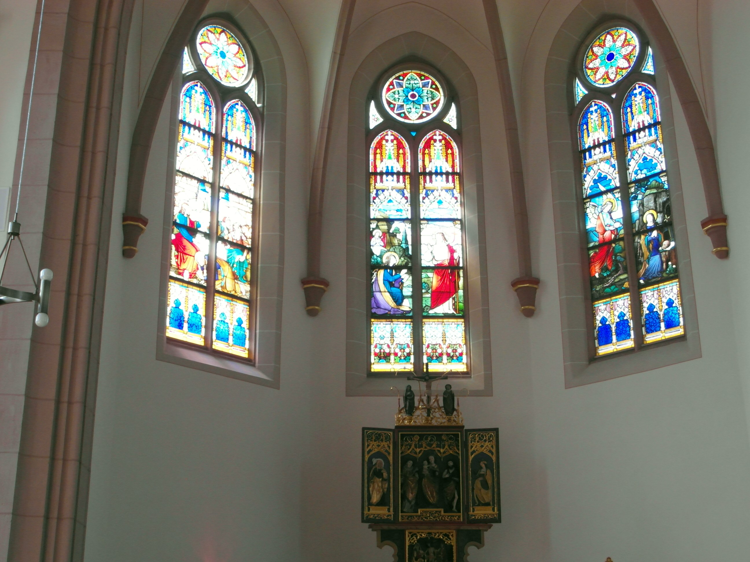 Altarraum der auch "Neue Kirche" genannten Magdalena-Kirche Leinefelde